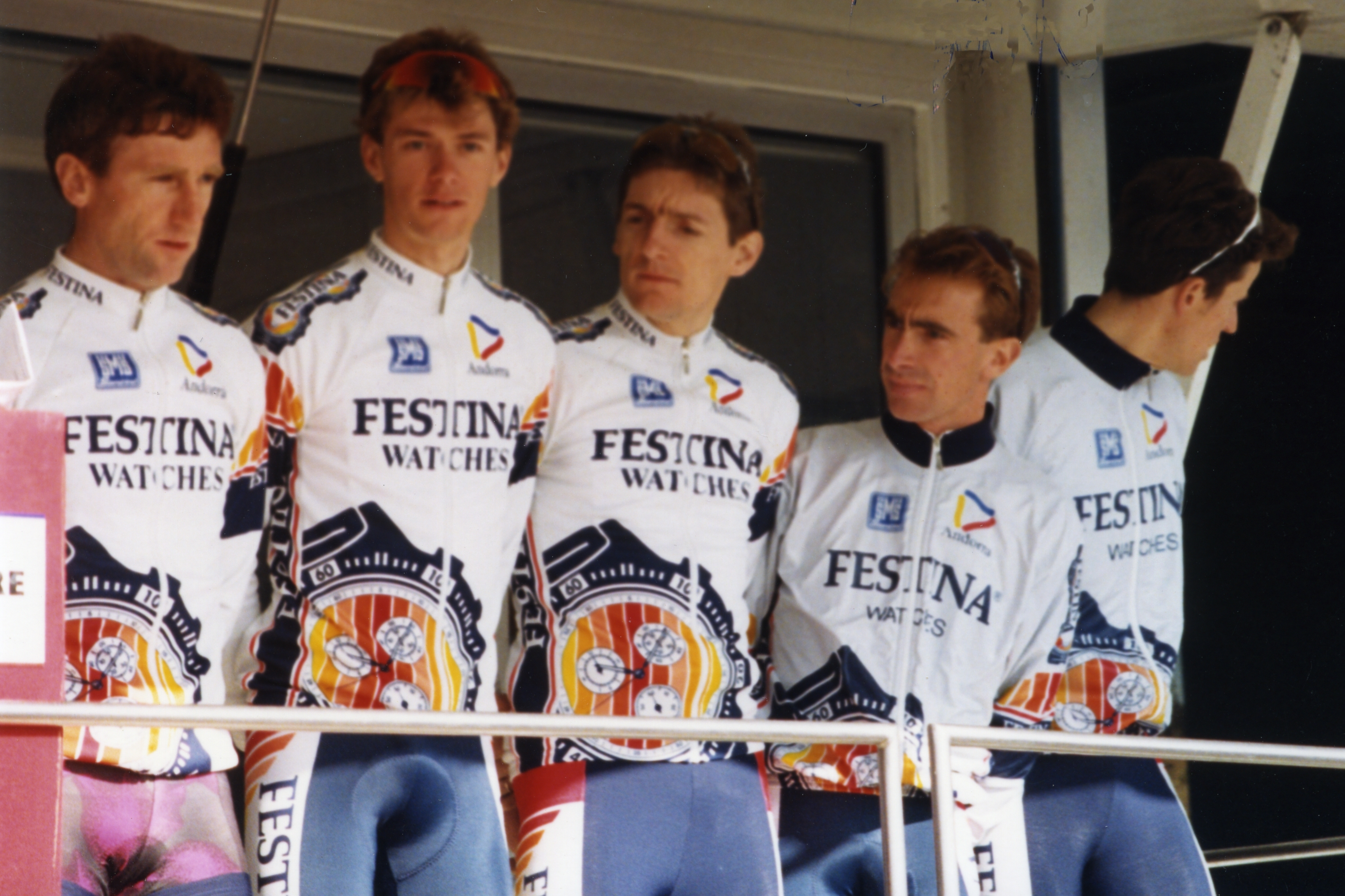 Départ du Paris-Nice 1993 à Meung-sur-Loire, de gauche à droite: Sean Kelly, Francisque Teyssier, Michel Vermote, Jean-Philippe Dojwa, Pascal Lino